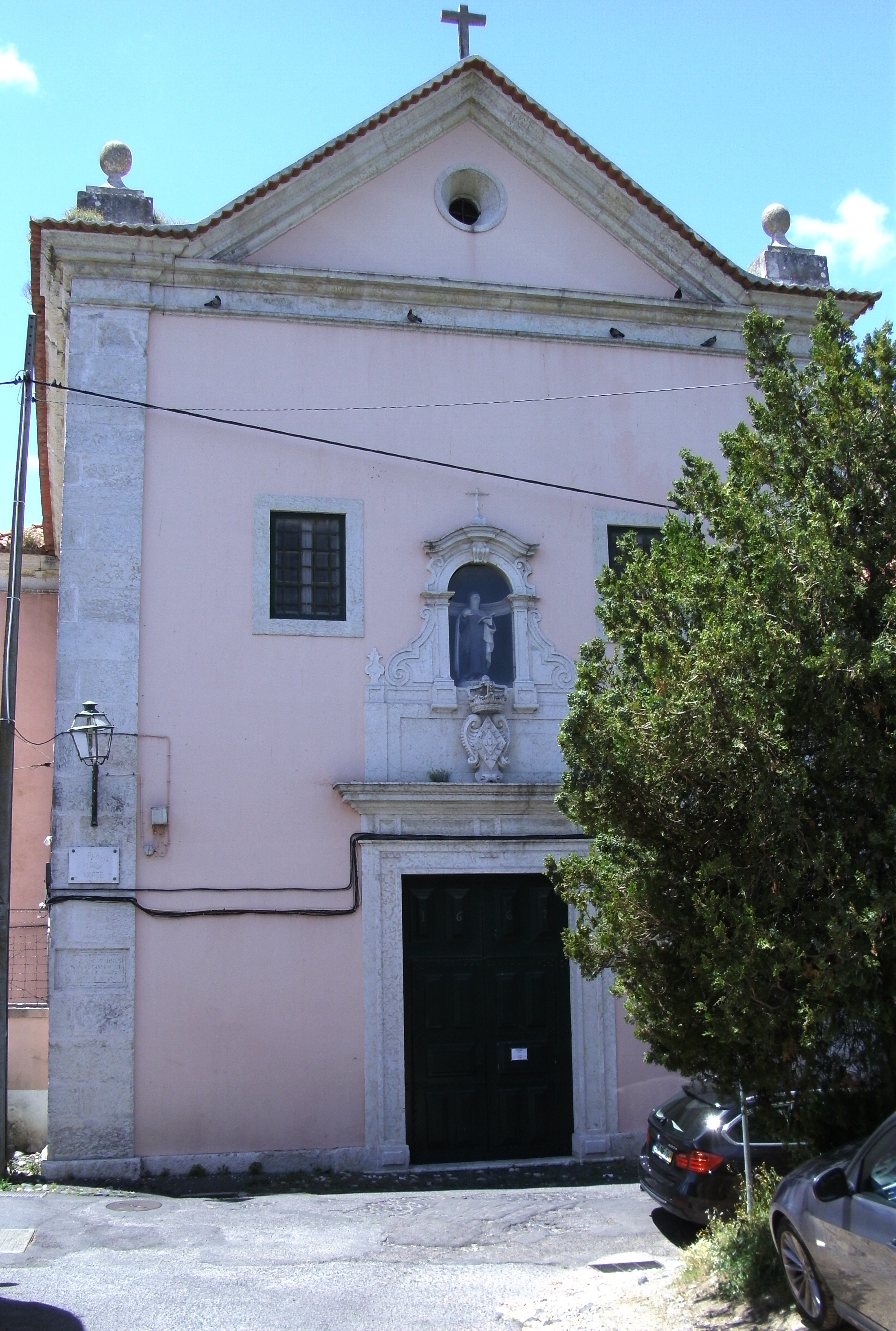 Convento de Santa Teresa de Jesus de Carnide